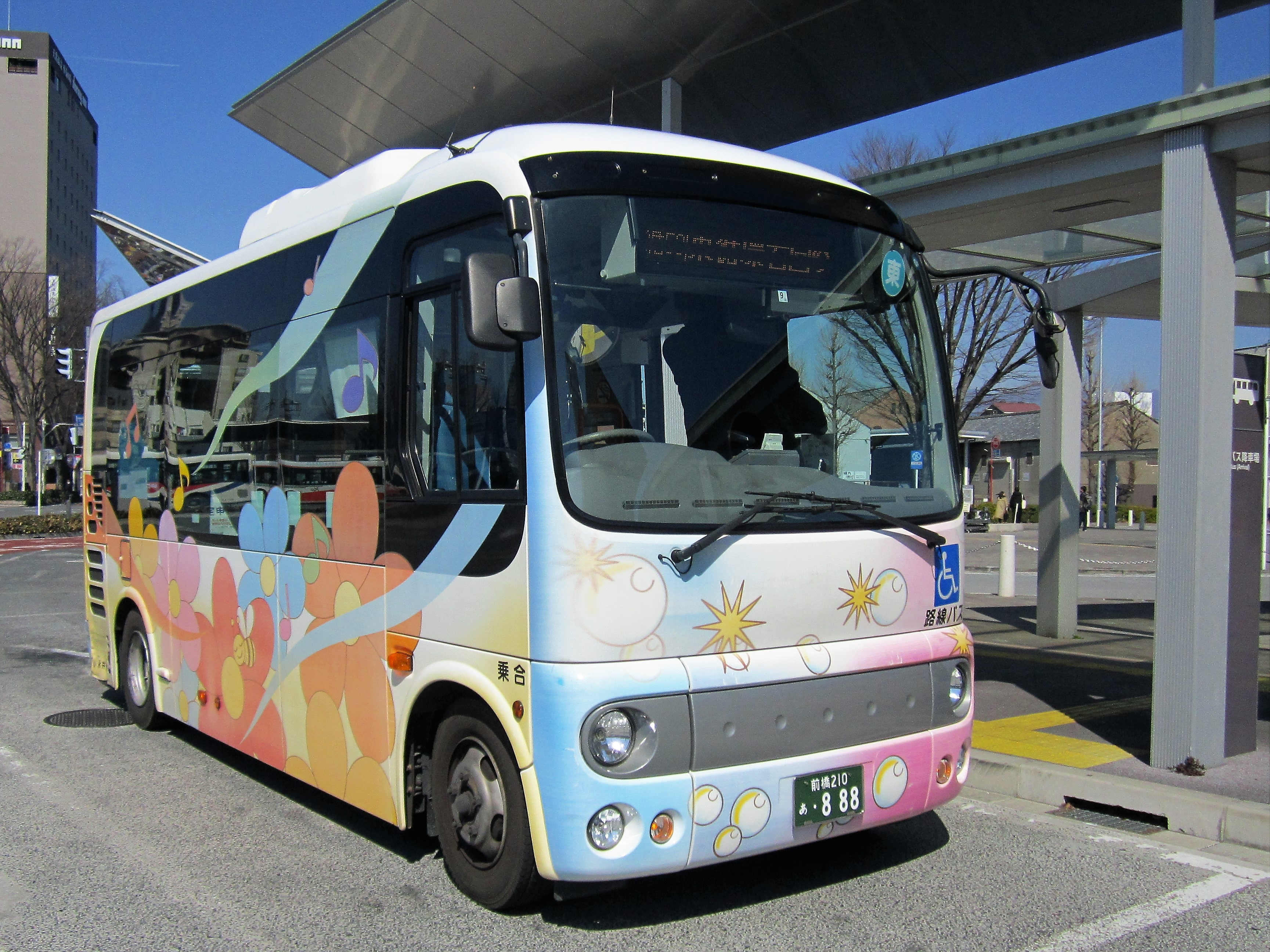 前橋駅北口に停車中のマイバス東循環線（永井運輸） Canon PowerShot A2200